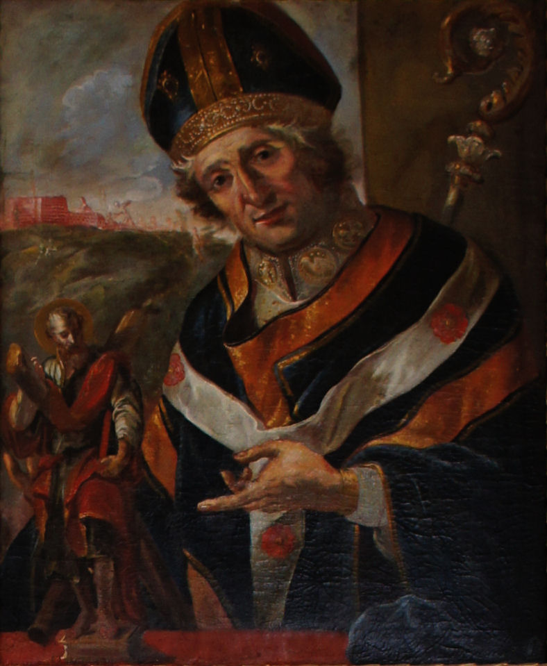 Porträtgemälde von Ellenhard, Bischof von Freising, im Fürstengang zwischen Fürstbischöflicher Residenz und Freisinger Dom.